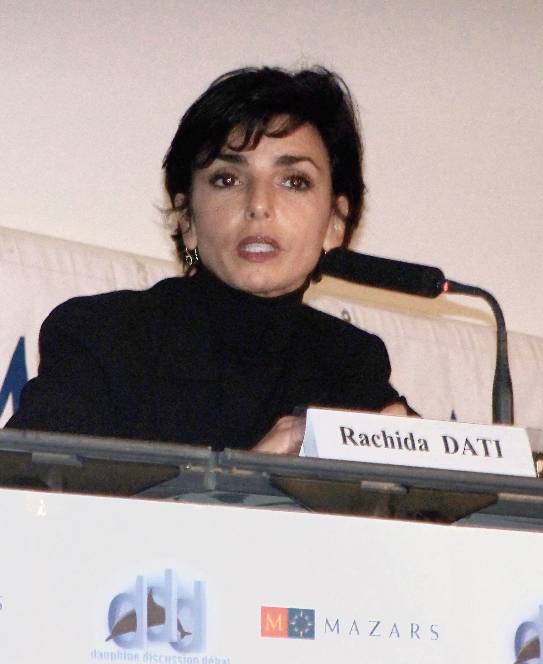 Rachida Dati devant plus de mille étudiants à l'université Paris-Dauphine le 17 janvier 2008.